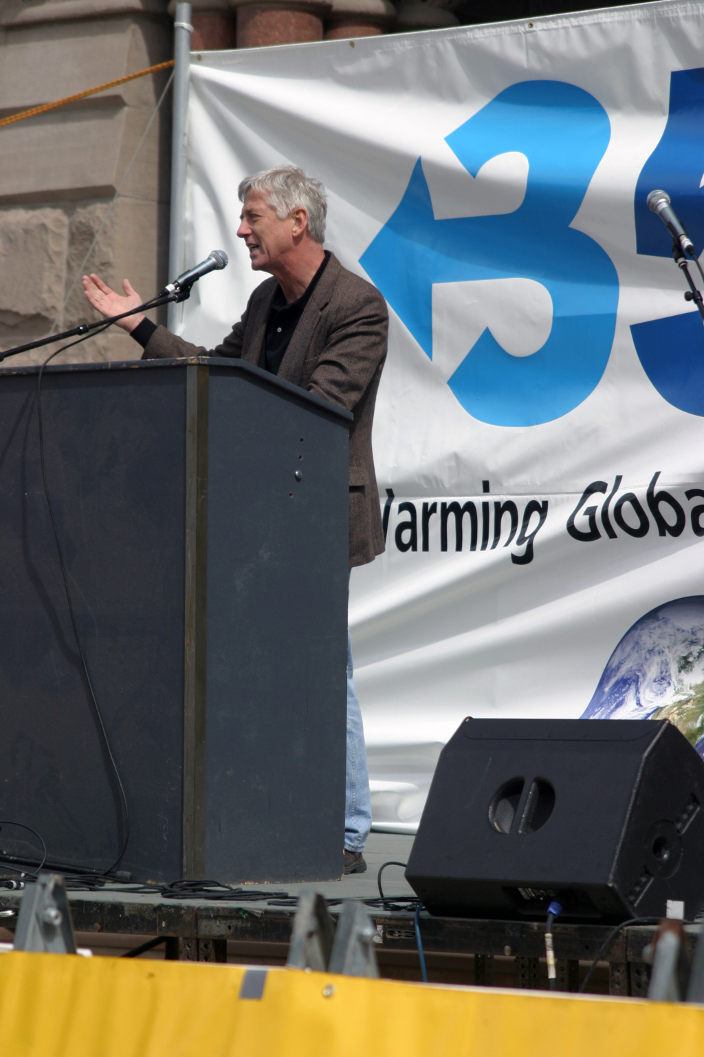 Rocky Anderson